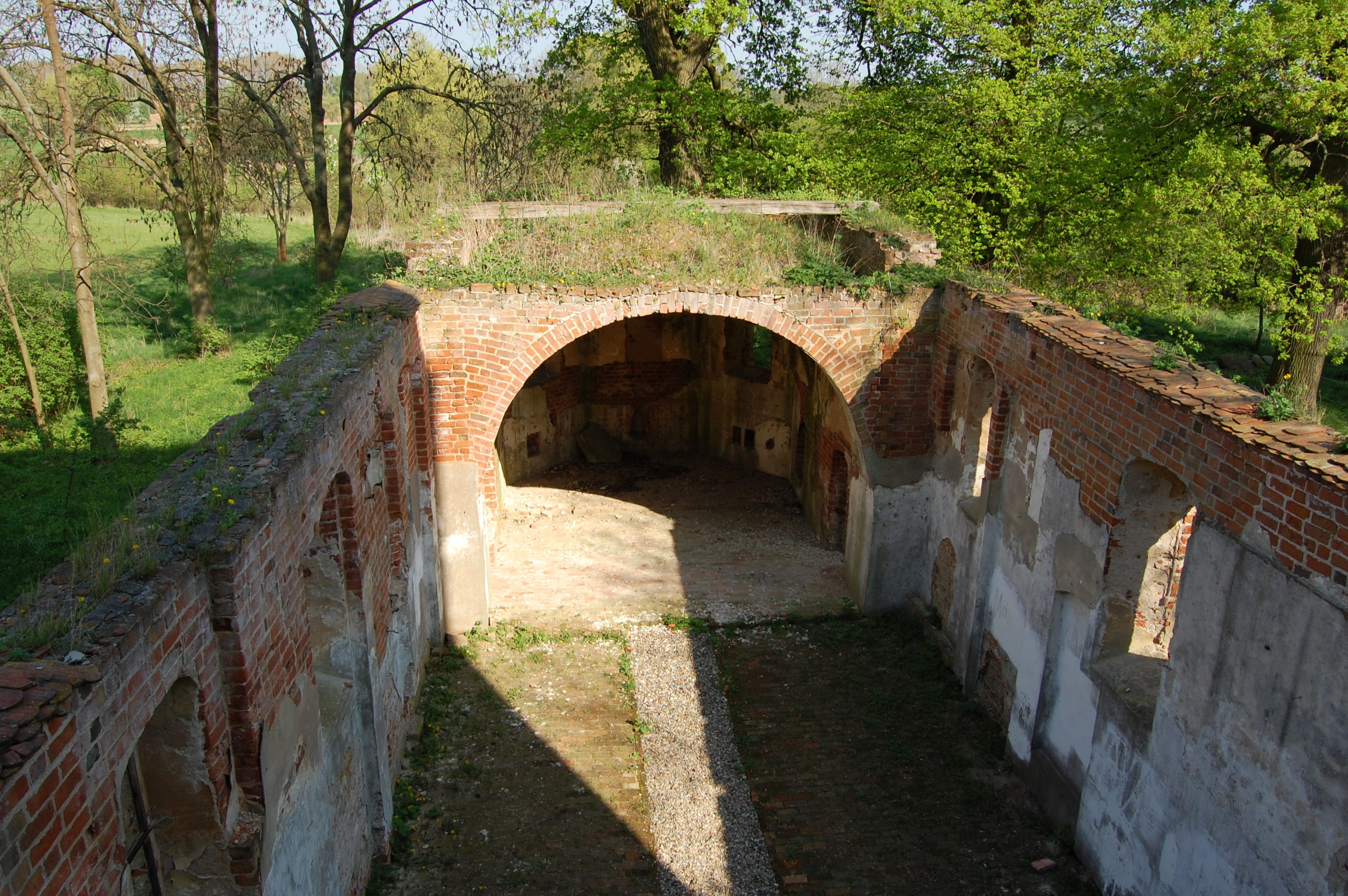 Blick auf das Kirchenschiff der Kirchenruine Käcklitz